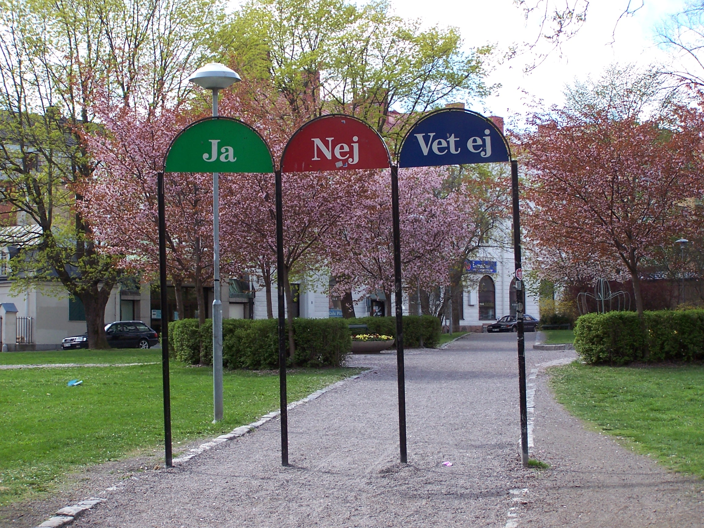 Konstverket Vägval av Jack Grafström i Hedbergska parken, Sundsvall